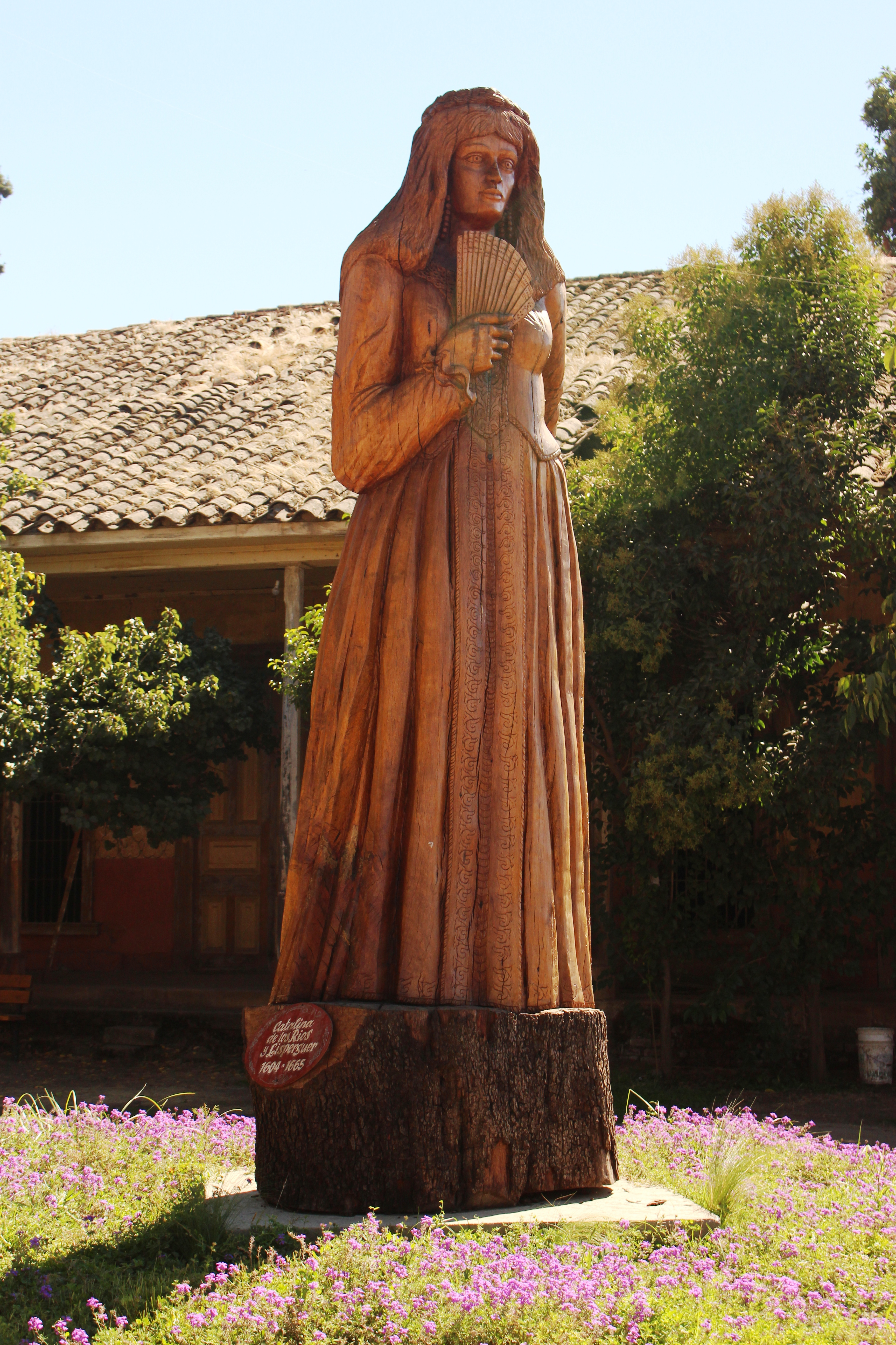 Monumento a La Quintrala, ubicado en sector La Compañía, comuna Graneros, Chile